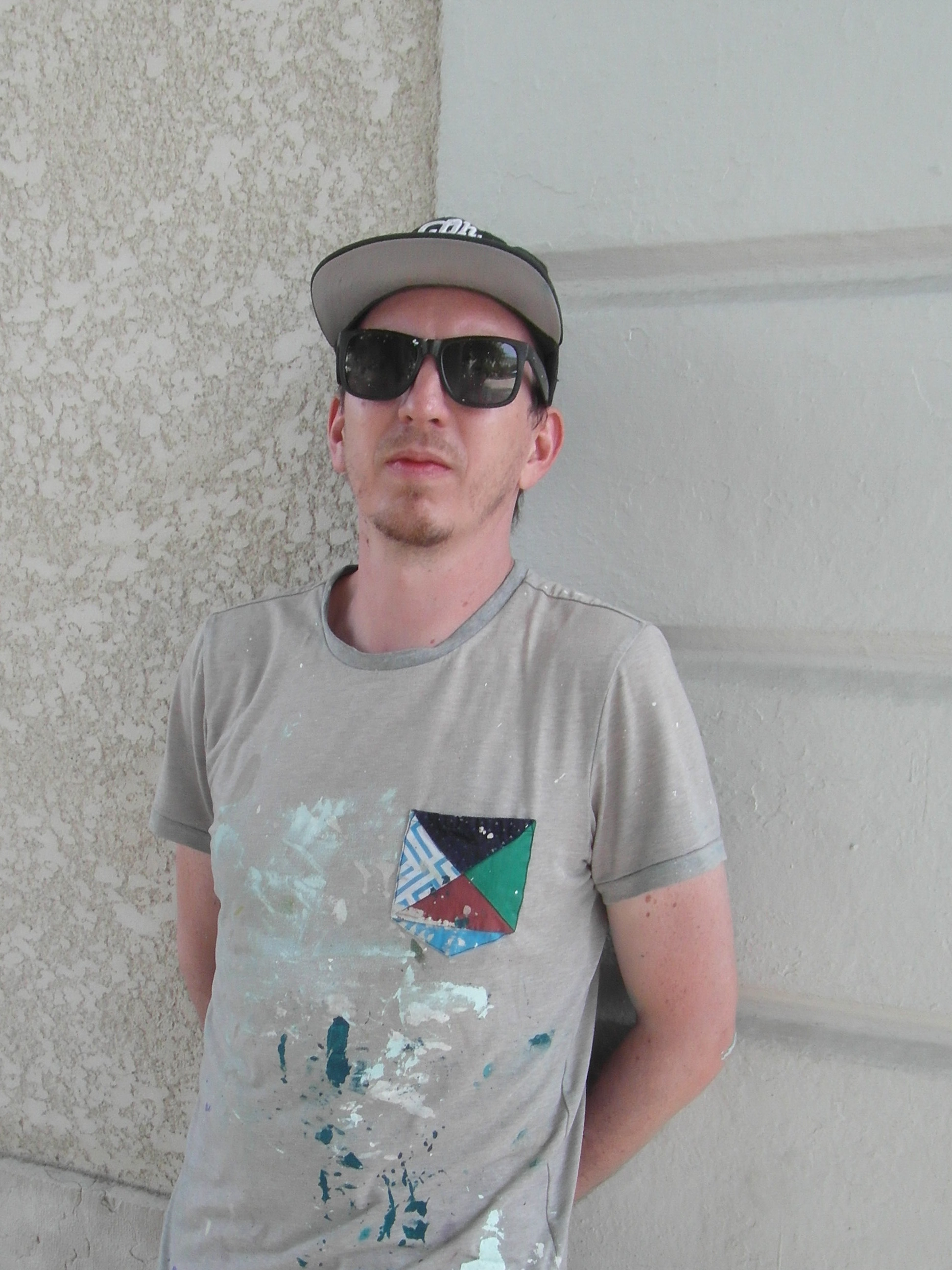 L'artiste Groek au GSA Fest